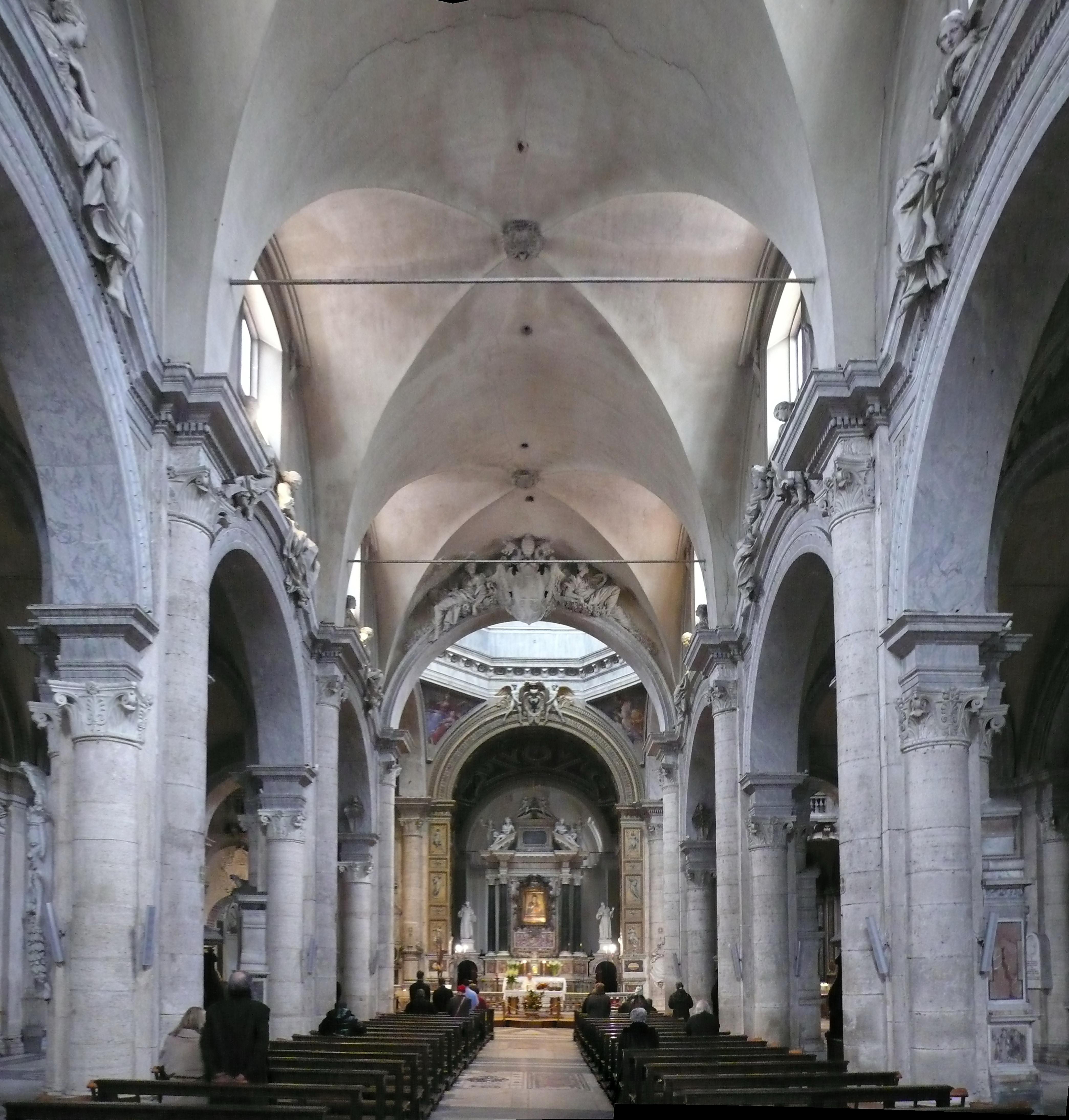 Rom - Basilika Santa Maria del Popolo